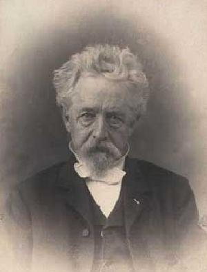 Photo